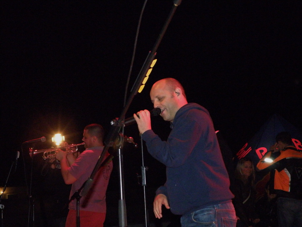 Sastav Hladno pivo. Nastup na 7. Mega Bikers susretima u Slavonskom Brodu.